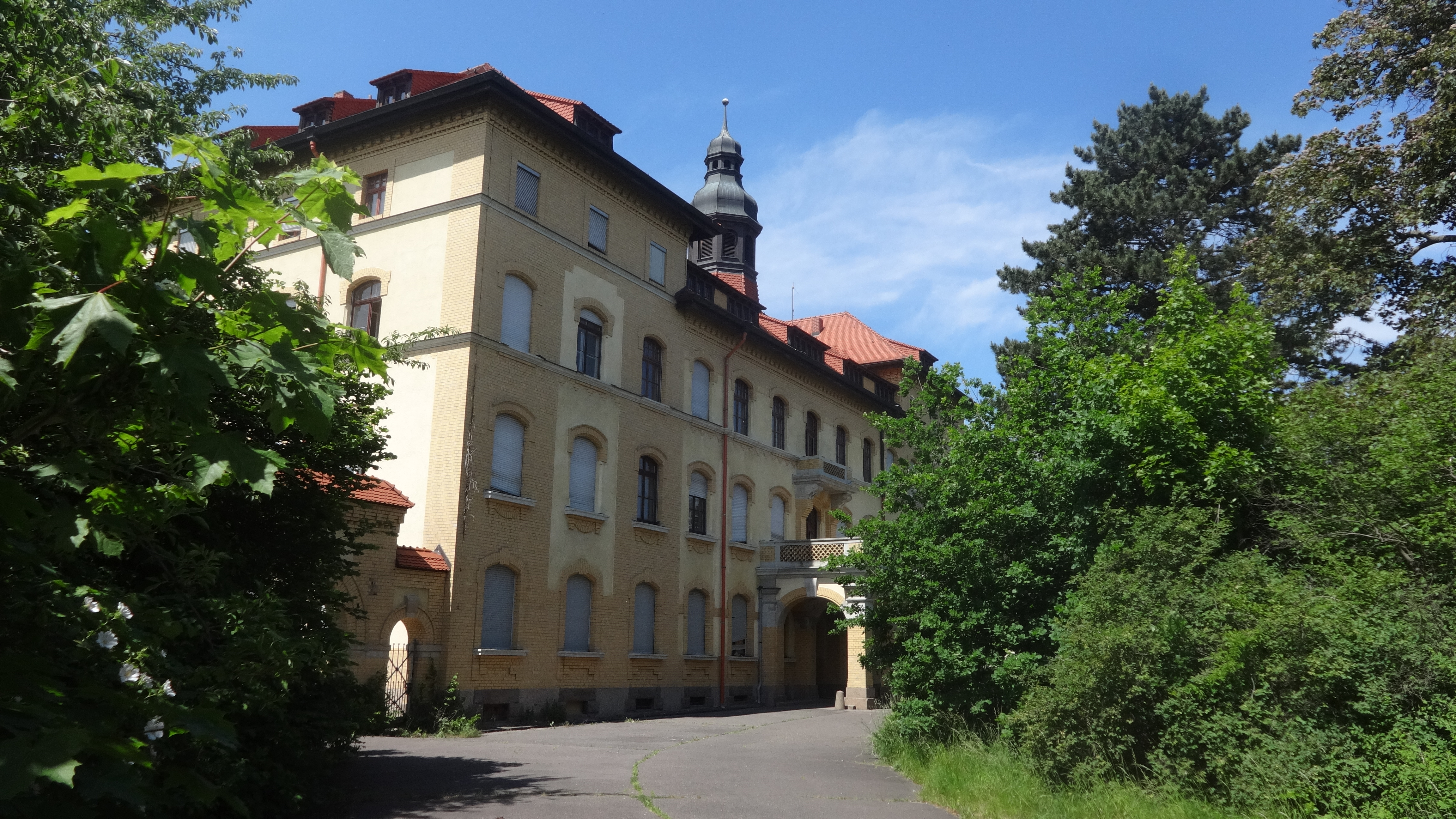 Leipzig, Meusdorf, Gelände des ehemaligen Park-Krankenhauses Dösen